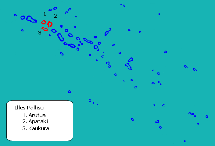 Mapa de localització de la comuna d'Arutua, o illes Palliser, a l'arxipèlag Tuamotu, Polinèsia Francesa.